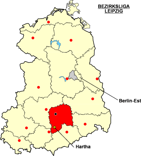 Localisation d'Hartha dans la "Bezirksliga Leipzig" à l'époque de la RDA Catégorie:Logo de clubs de football - Allemagne